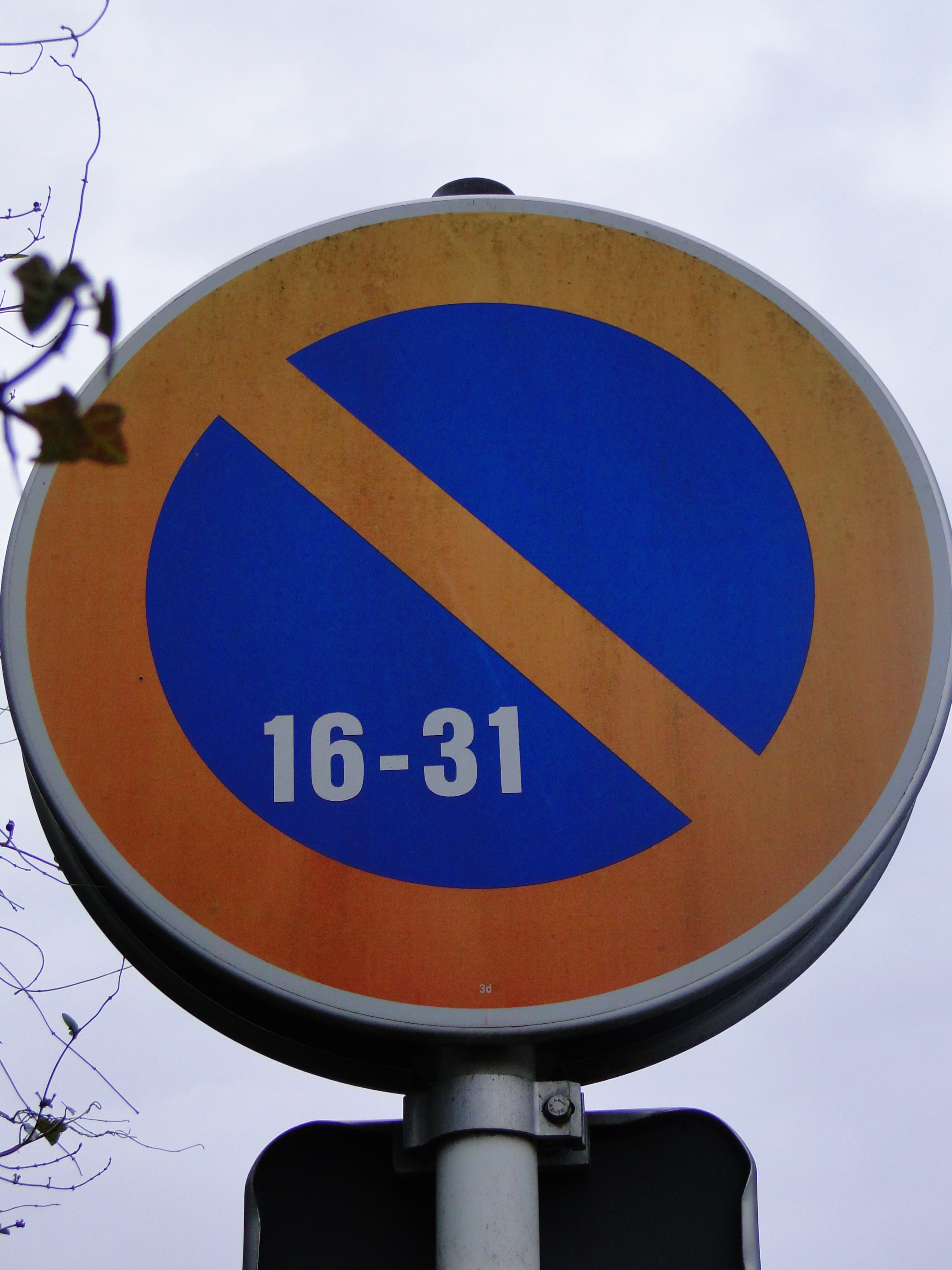 Verkéiersschëld C,20b "Stationnement alterné" (16-31) aus dem lëtzebuerger Code de la Route